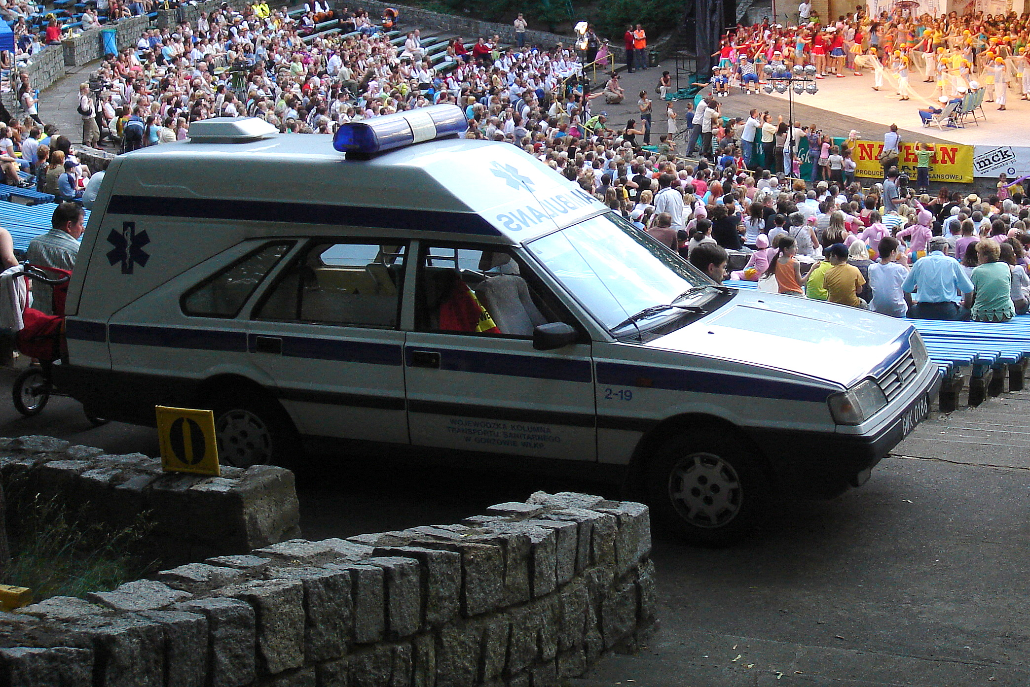 FSO Polonez Cargo - sanitarka, podczas zabezpieczania imprezy masowej. Wojewódzka Kolumna Transportu Sanitarnego w Gorzowie Wlkp.